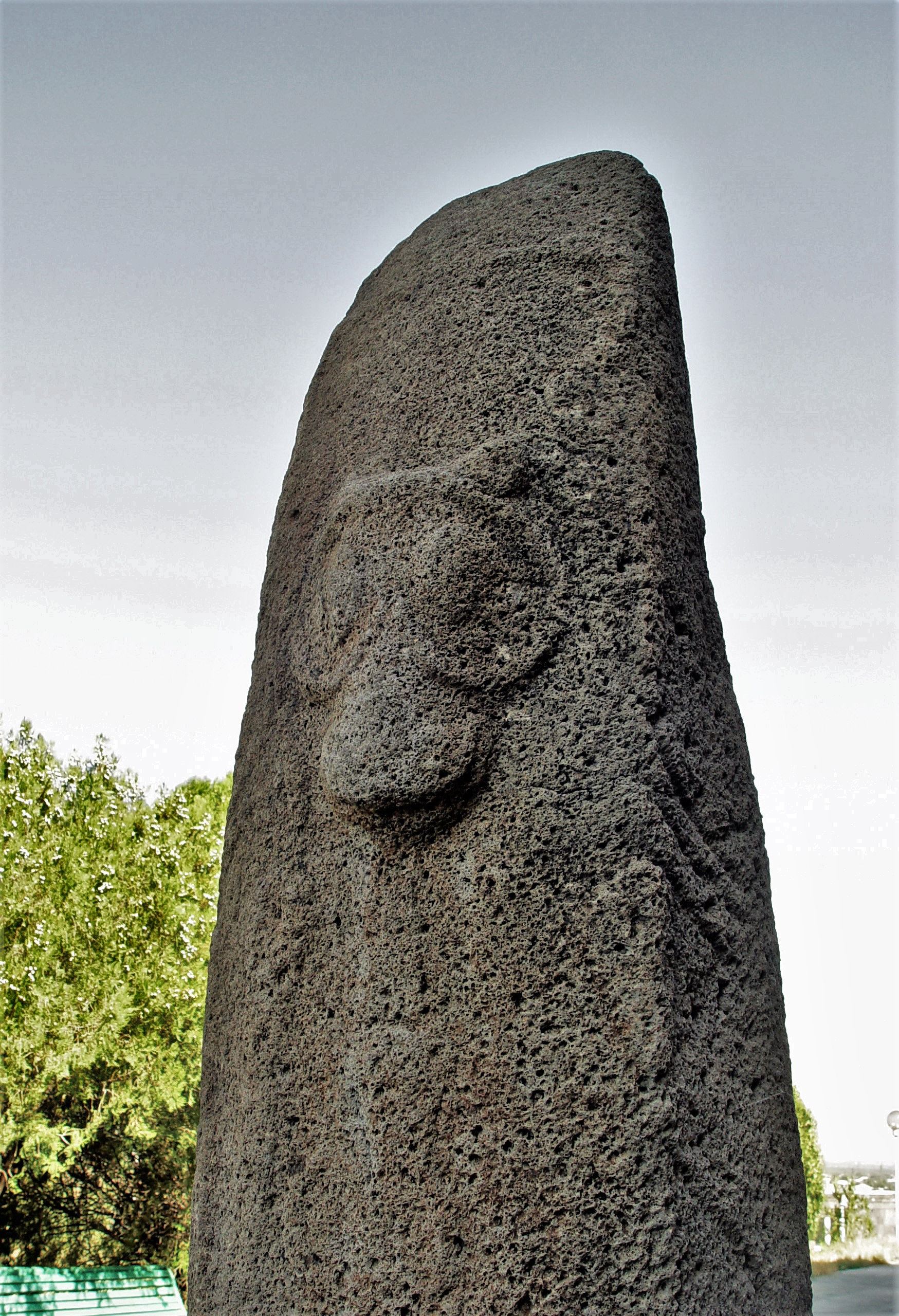 Vishap